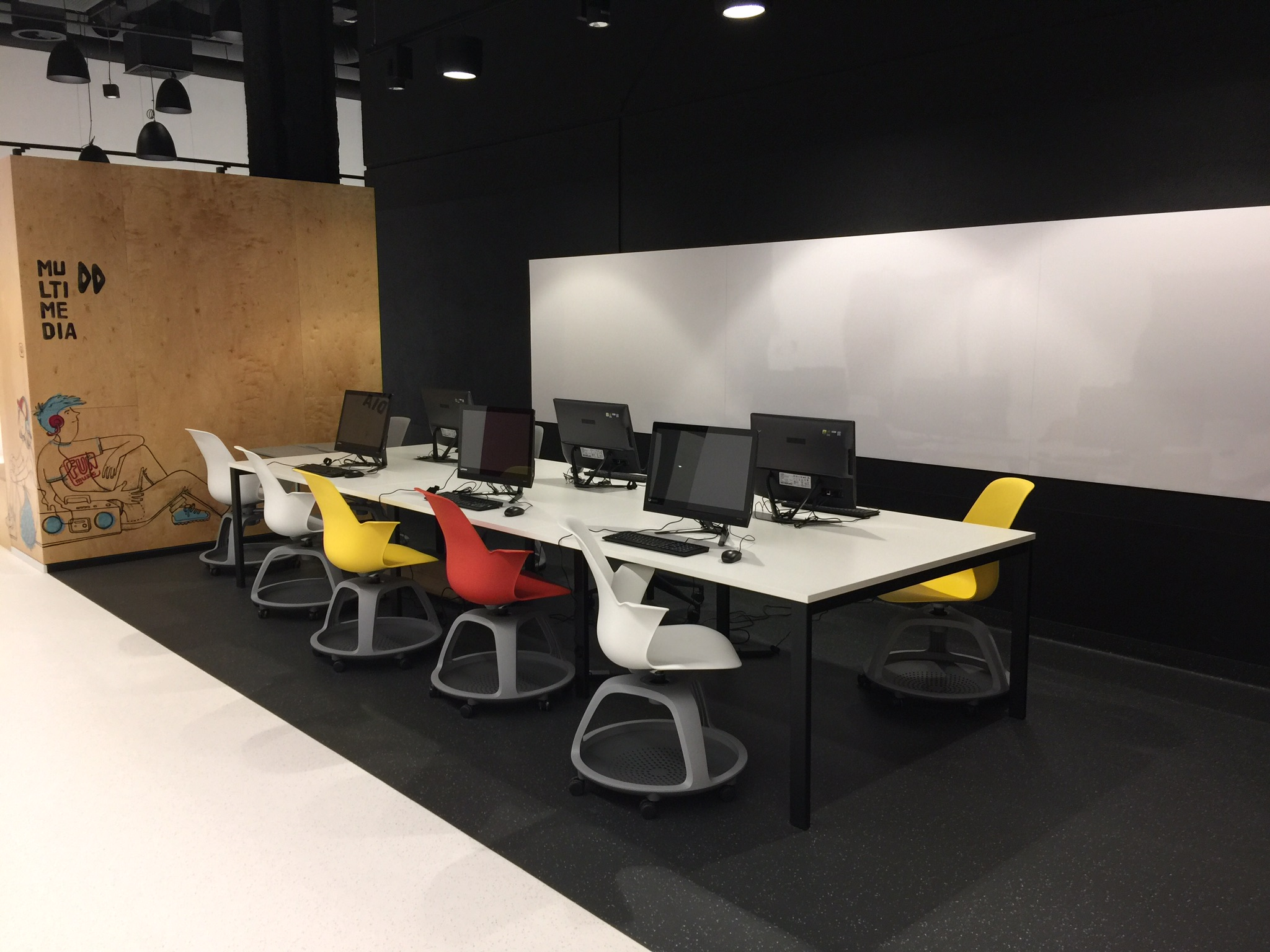 Pracownia edukacyjna w SIEMACHA Spot Magnolia we Wrocławiu, kwiecień 2017